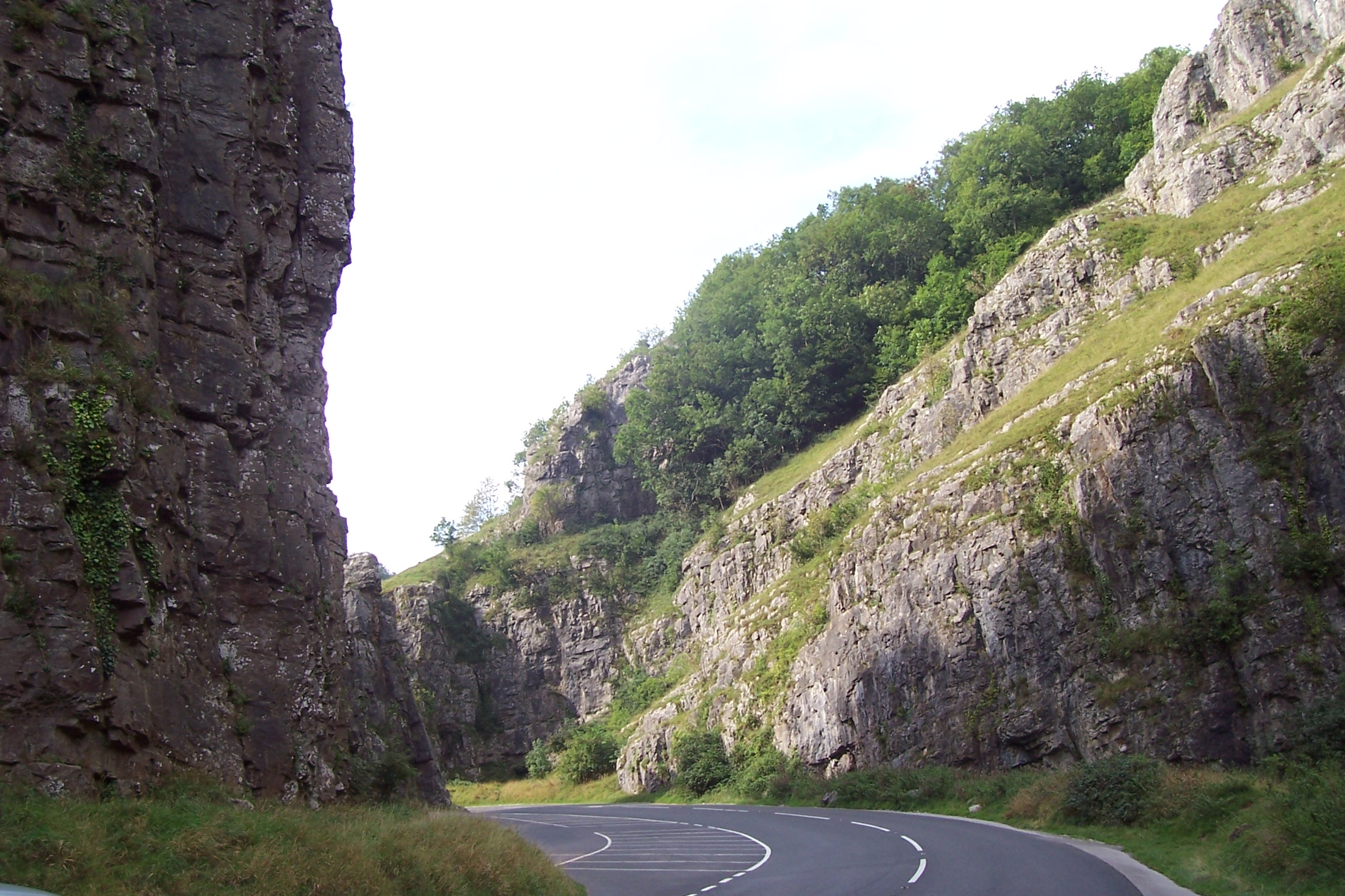 Cheddar Gorge